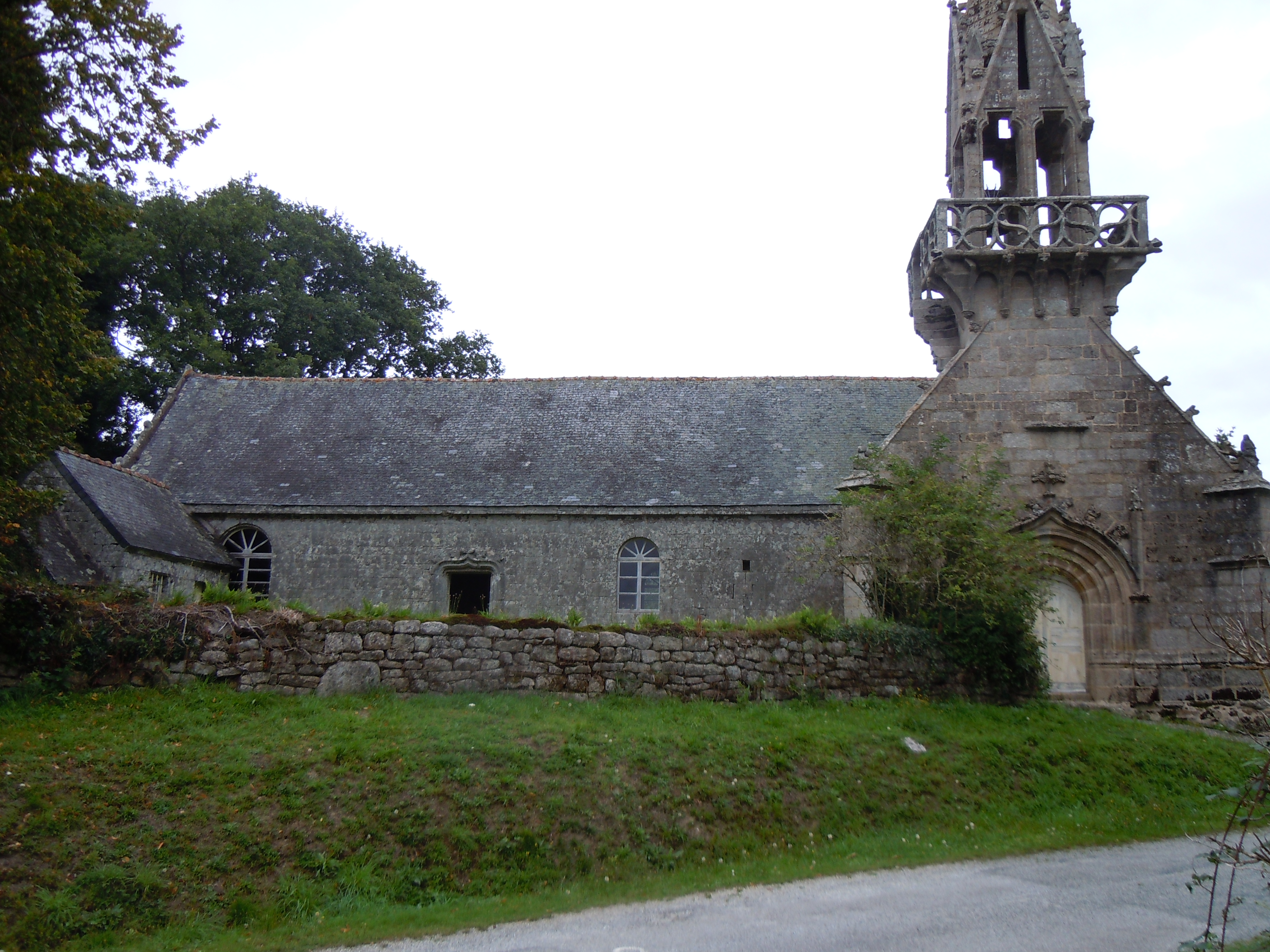 chapelle Saint-Yves de Lignol, pignon flamboyant, département du Morbihan, France